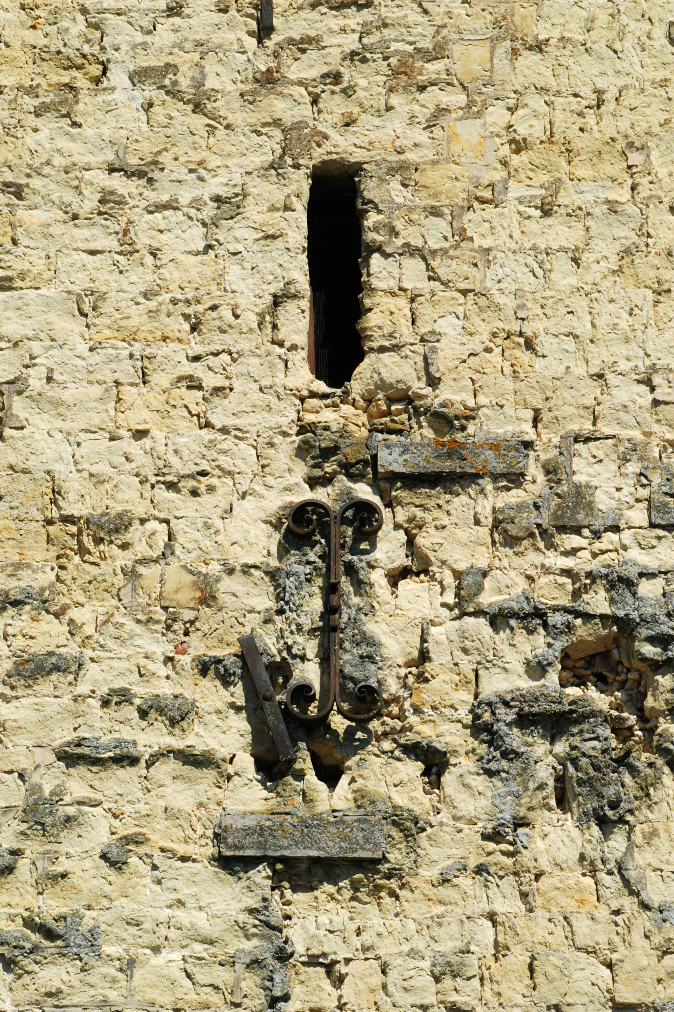 Belgique - Brabant wallon - Hélécine - Neerheylissem - Eglise Saint-Sulpice